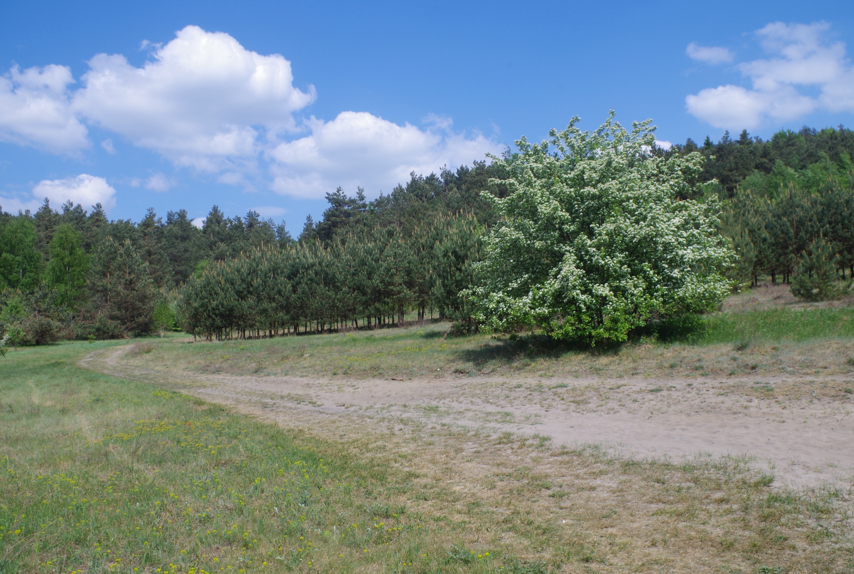 Szlak wiodący z Podlesic przez Górę Sowią